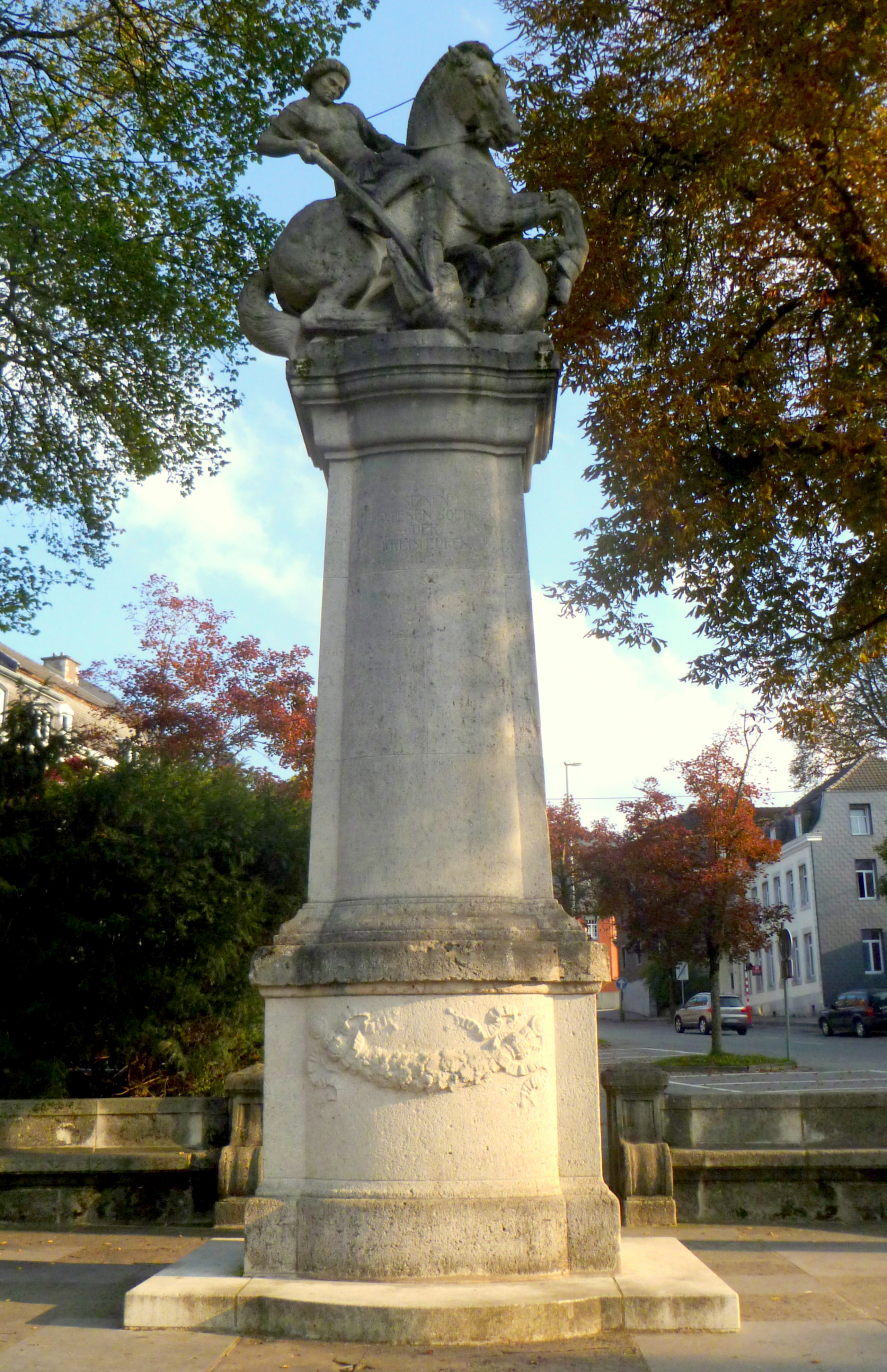 Vorderansicht des Kriegerdenkmals in Eupen, Werthplatz; 1912 von Bildhauer Rudolf Henn (München); unter Denkmalschutz